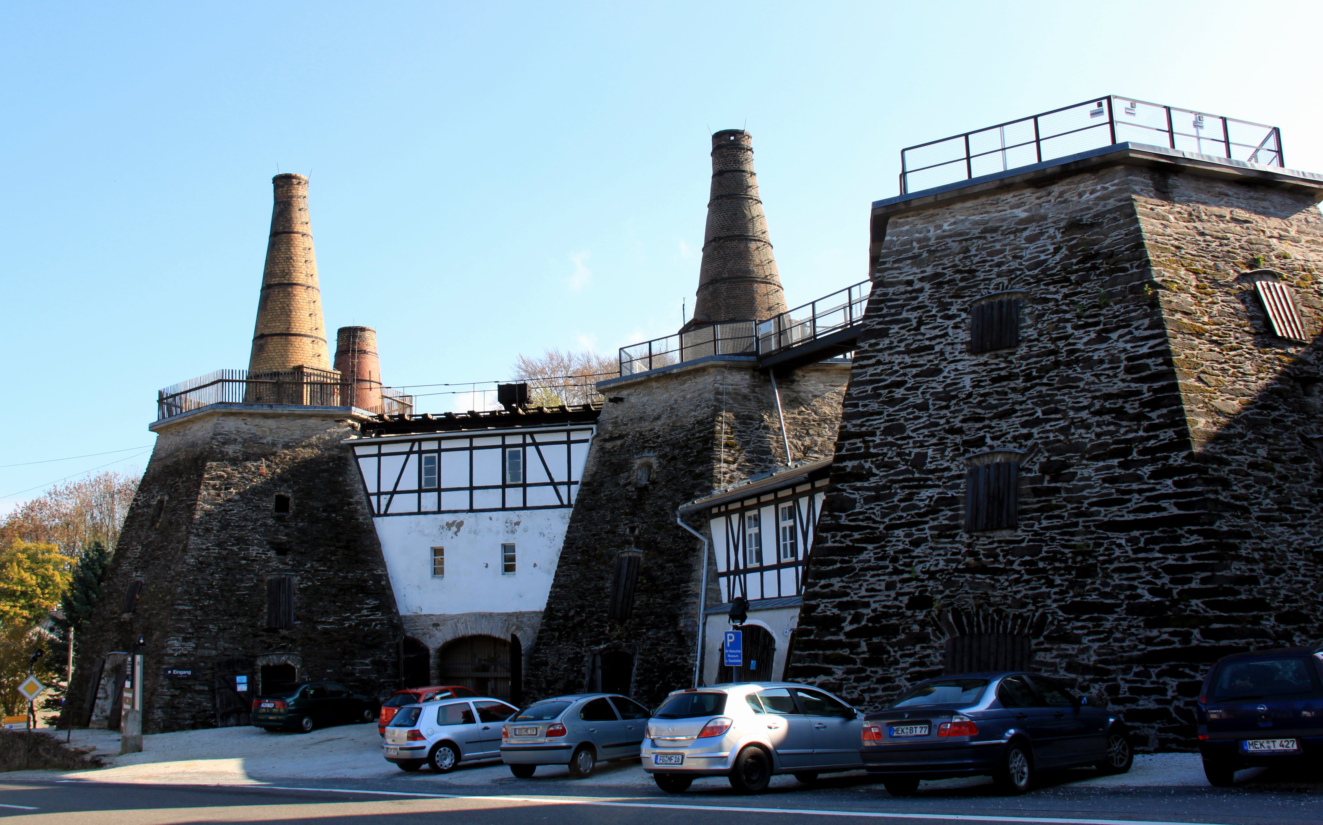 Kalkwerk Lengefeld, Technisches Museum im Erzgebirge